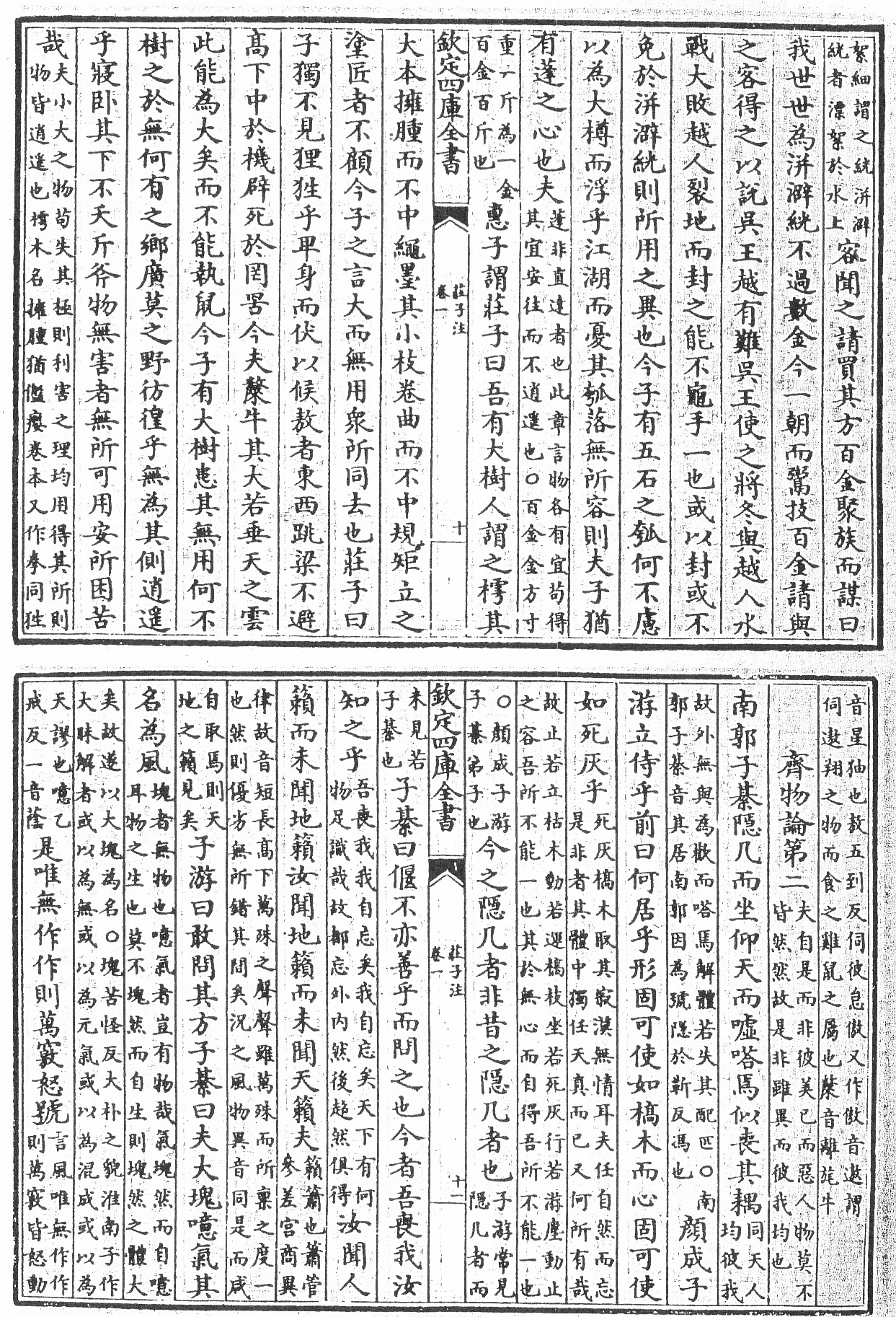 Eine Seite aus dem Zhuangzi, one page from the Zhuangzi